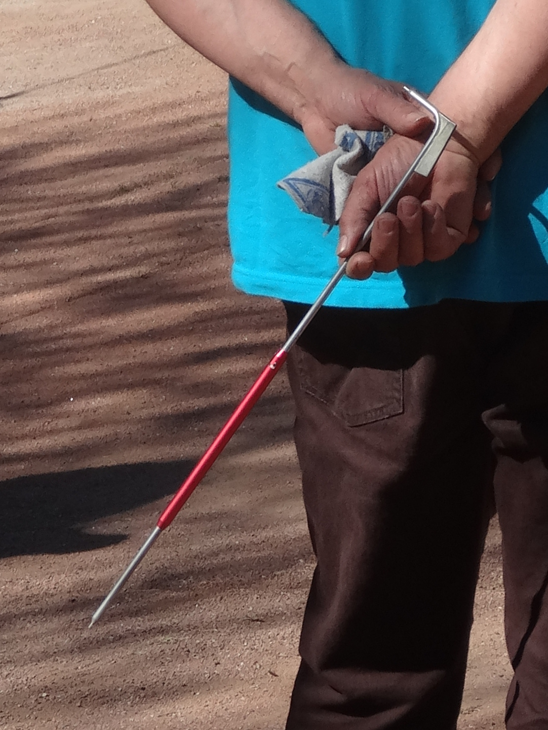 Un cinquante.